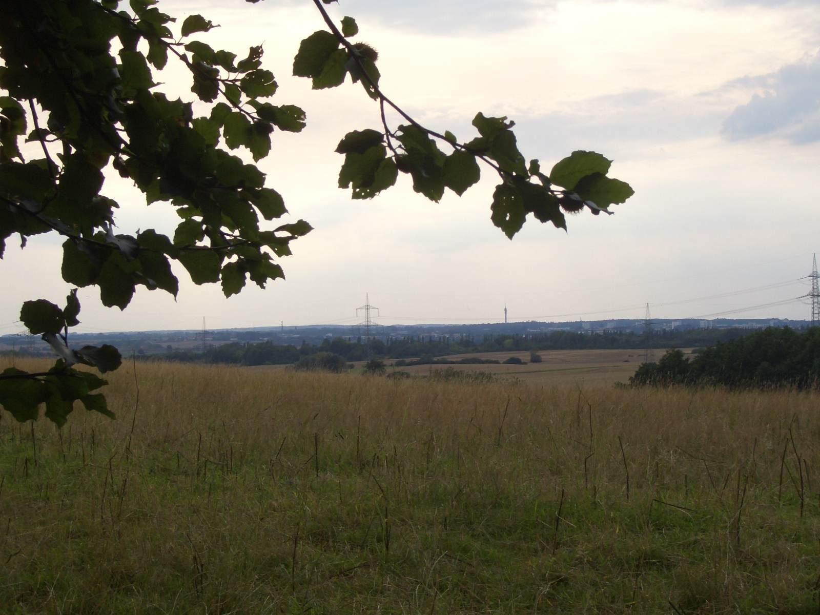 Rostocker Heide und Naturschutzgebiet Kösterbeck.